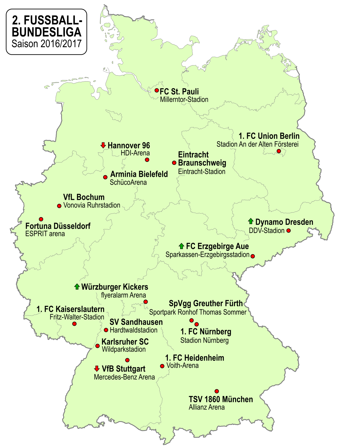 Karte der Vereine der 2. Fußball-Bundesliga-Saison 2016/2017